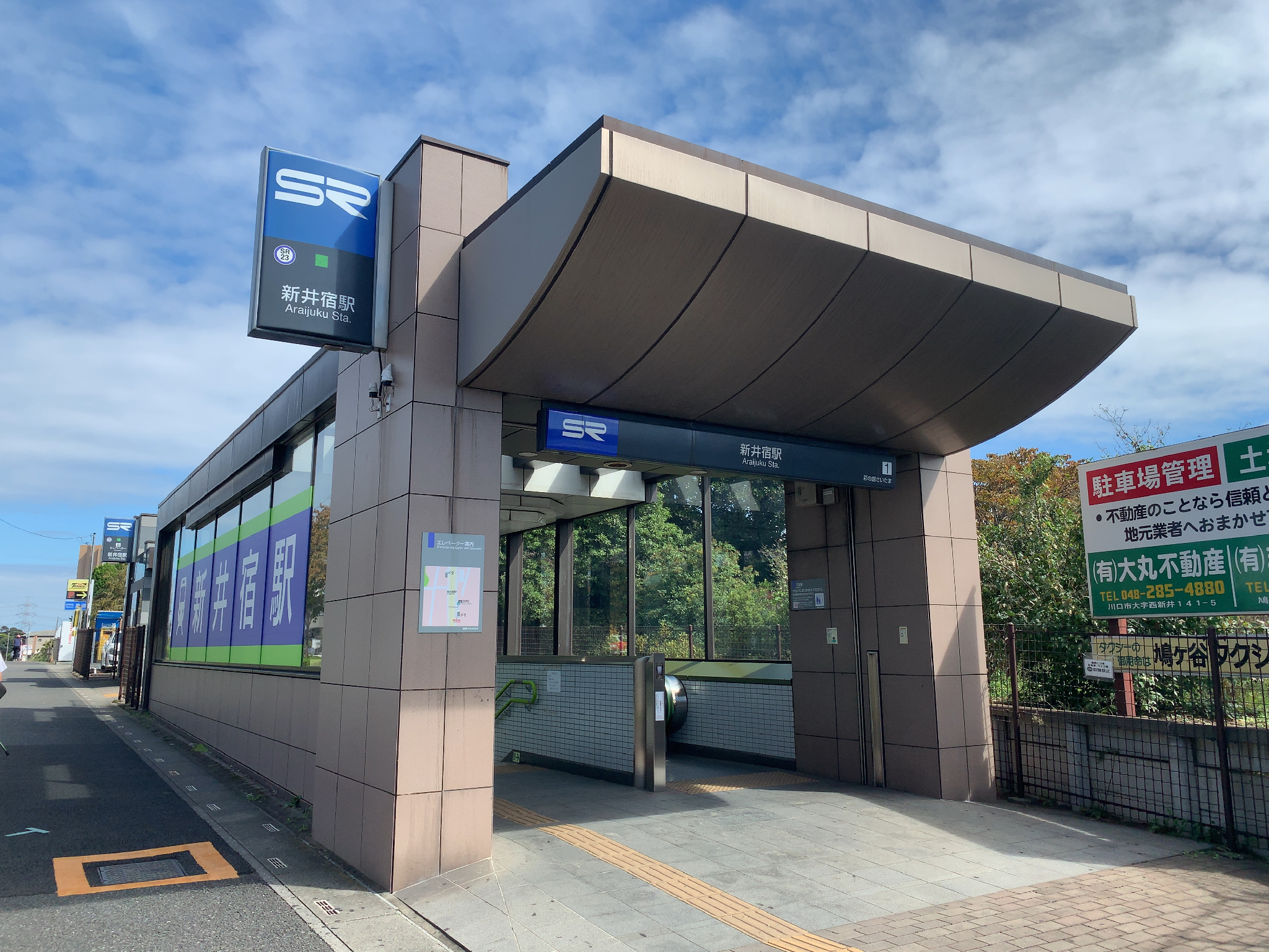 埼玉高速鉄道 新井宿駅 1番出入口